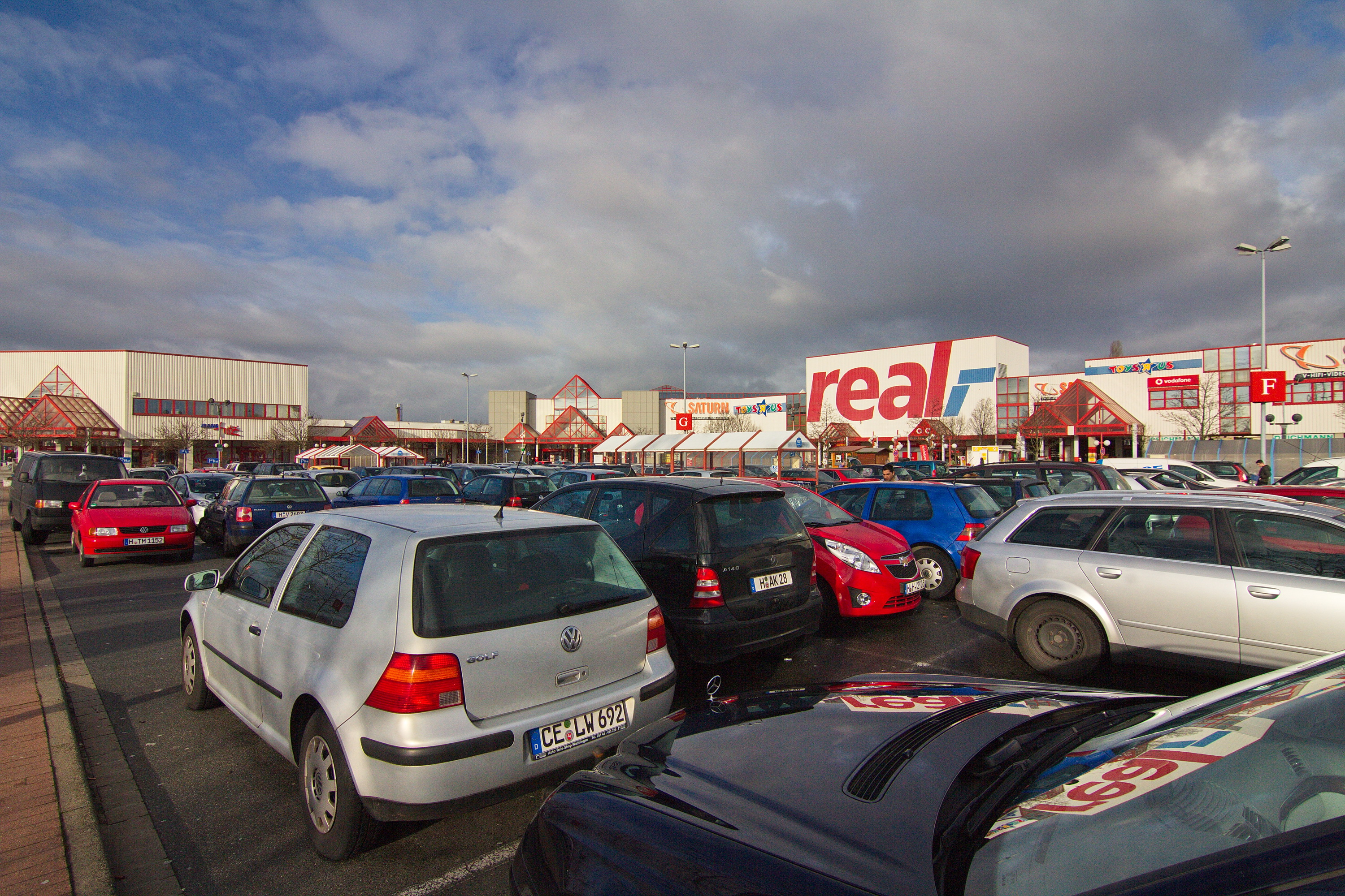 Gewerbegebiet in Altwarmbüchen (Isernhagen), Niedersachsen, Deutschland.